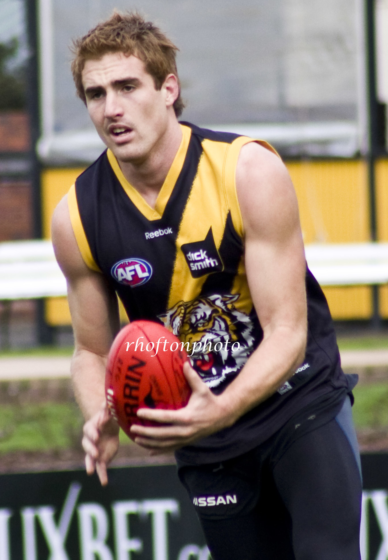 Daniel Jackson, Richmond training august 1st 09